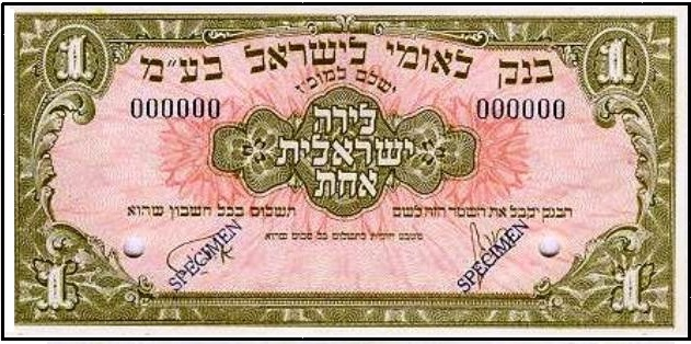 לירה ישראלית סדרת בנק לאומי 1952